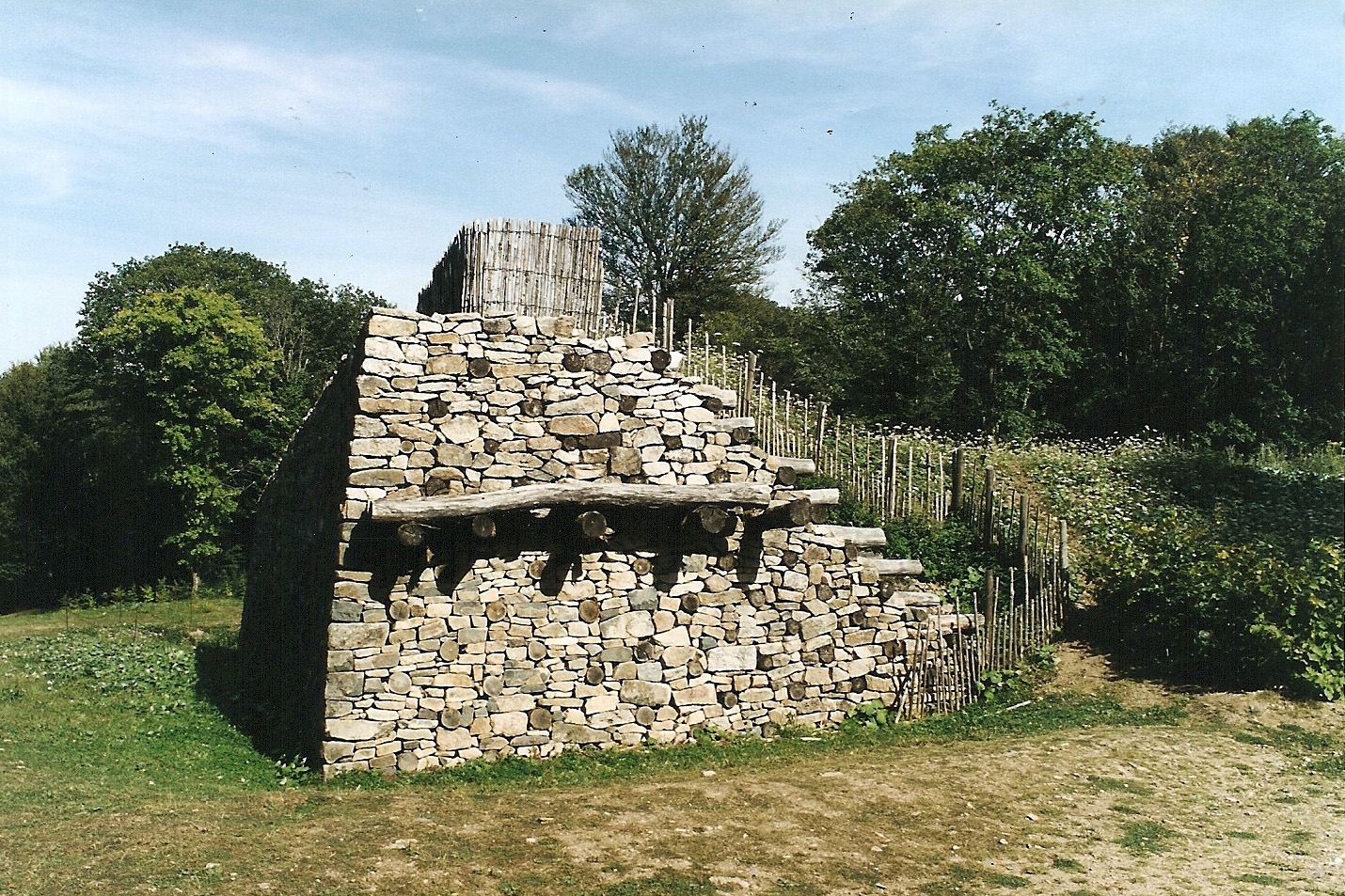 Bibracte, murus gallikus